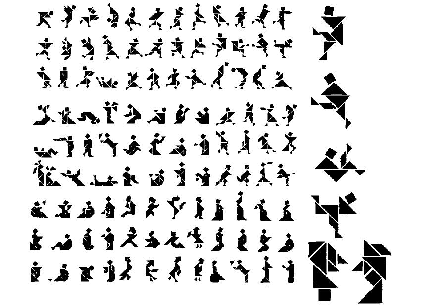 ট্যানগ্রাম দিয়ে তৈরি বিভিন্ন আকৃতি